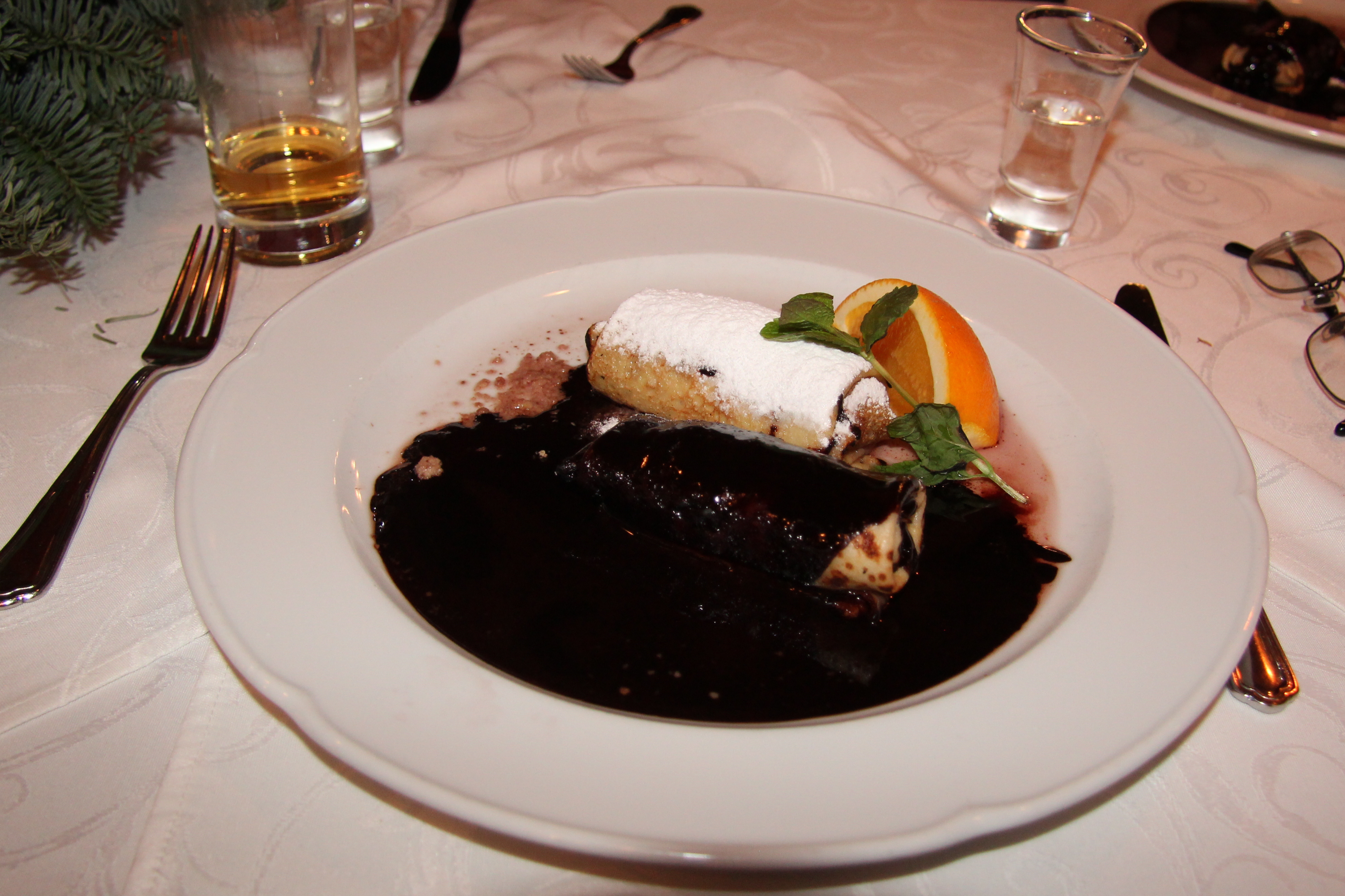 Gundel-Palatschinke im Matthiaskeller in Budapest